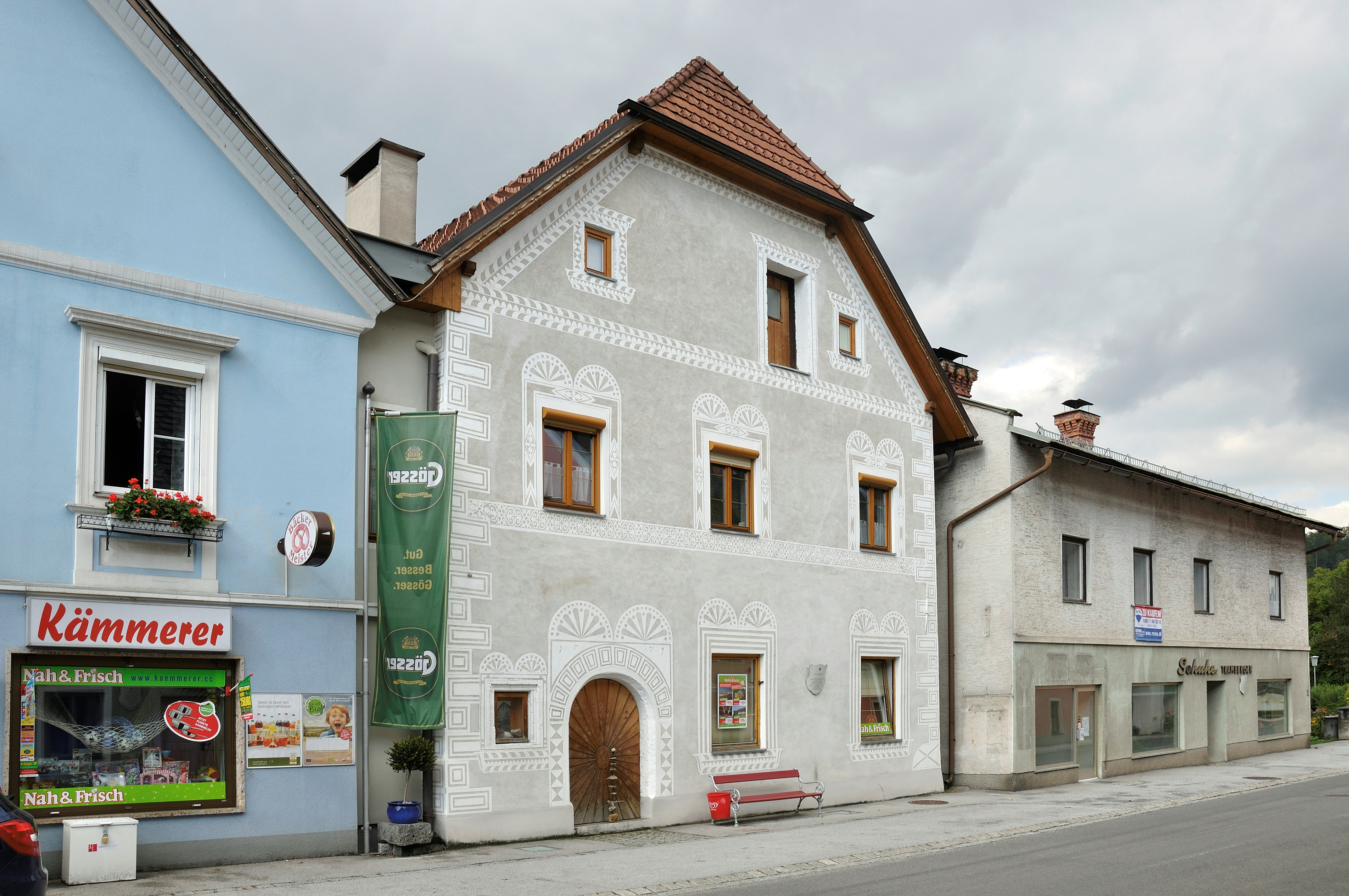 Ehem. Gemeindeamt